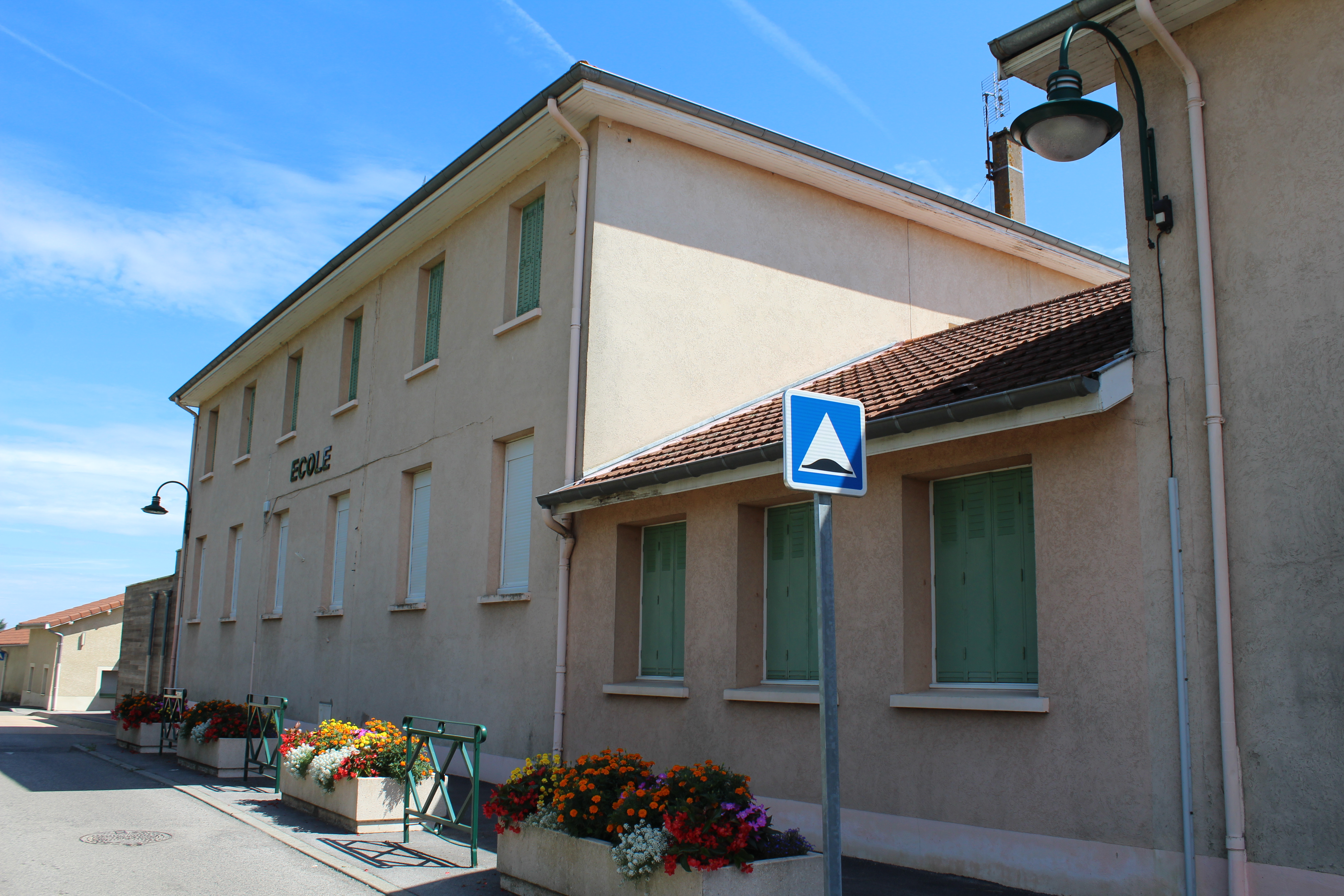 École publique de Cruzilles-lès-Mépillat.